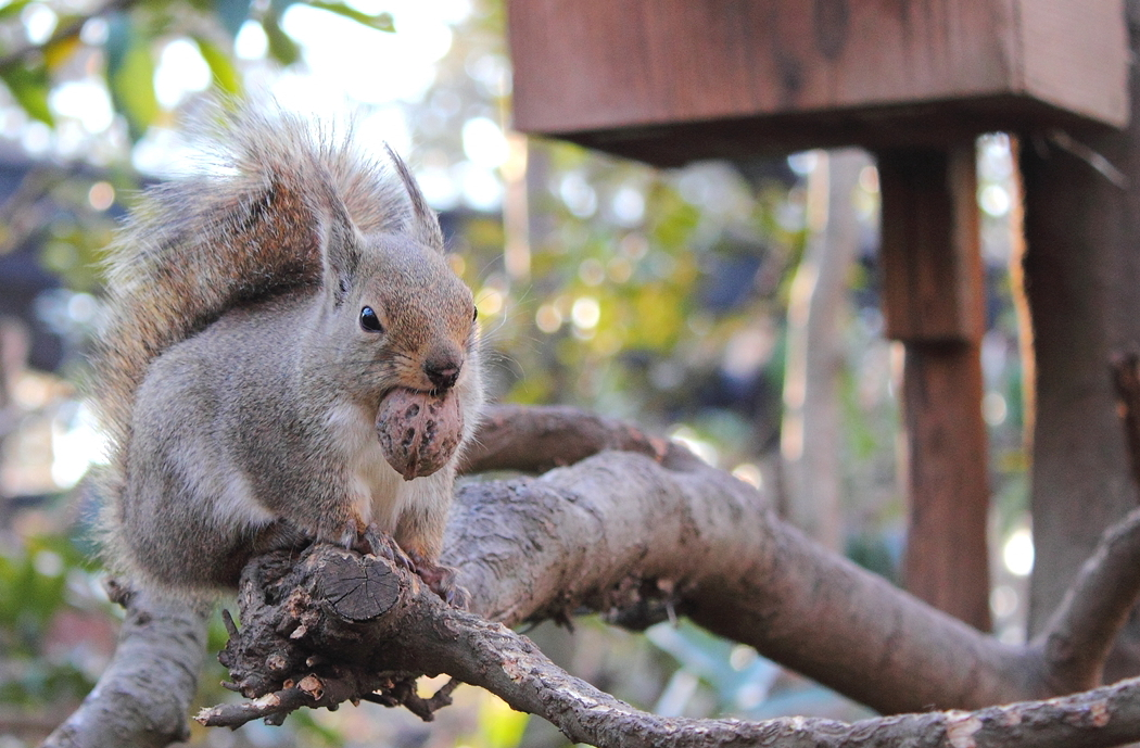 ニホンリス（井の頭自然文化園にて）